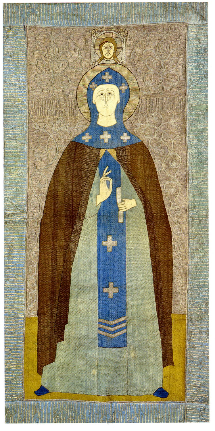 Преподобная Анна Кашинская Век: XVII Датировка: 17 в. Середина Материал: Шелк, золотные, серебряные и шелковые нити. Место хранения: Государственный Исторический музей Происхождение: Поступил из музея г. Кашина в 1955 г. Размер: 196 х 99